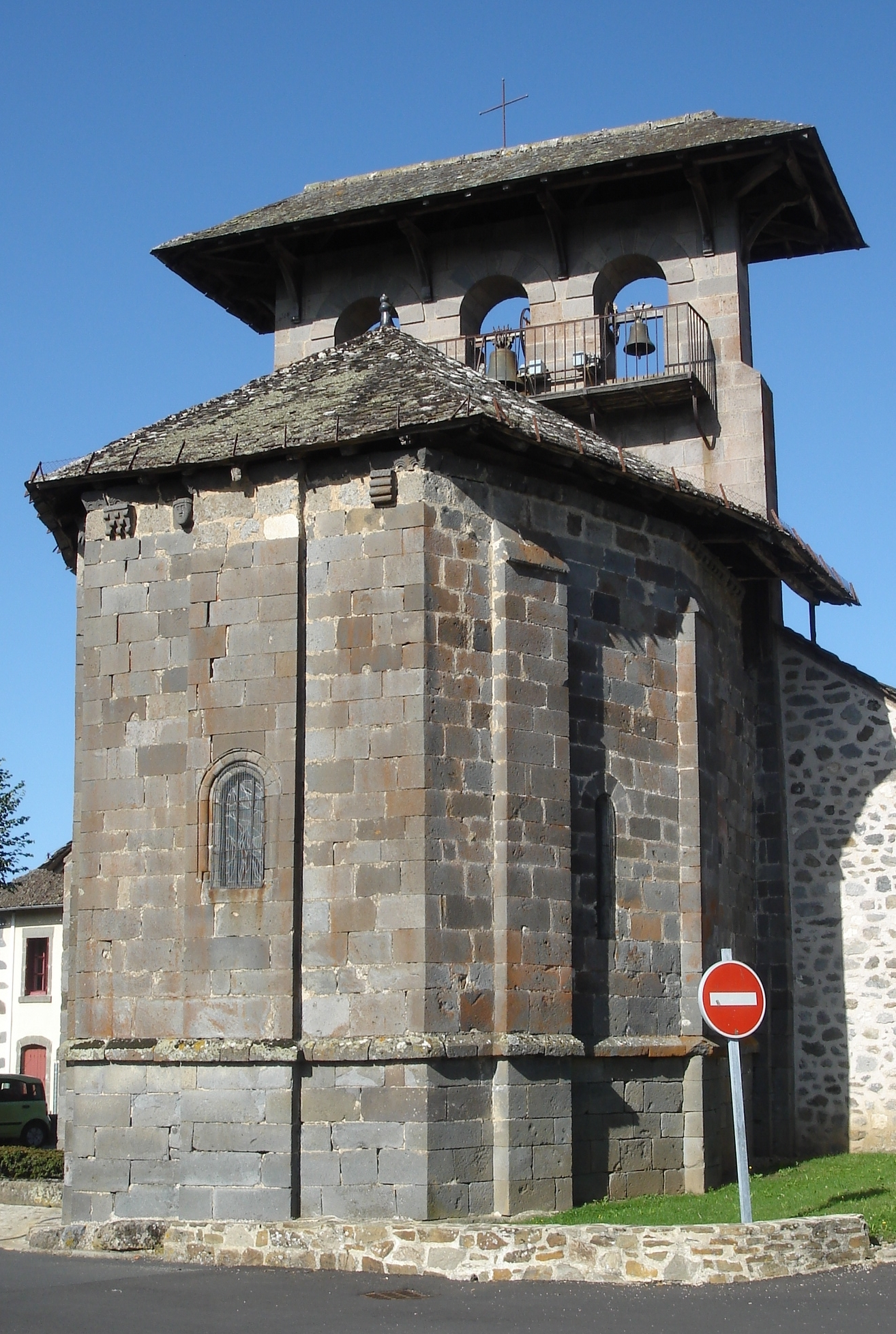 Église paroissiale de Reilhac (15)